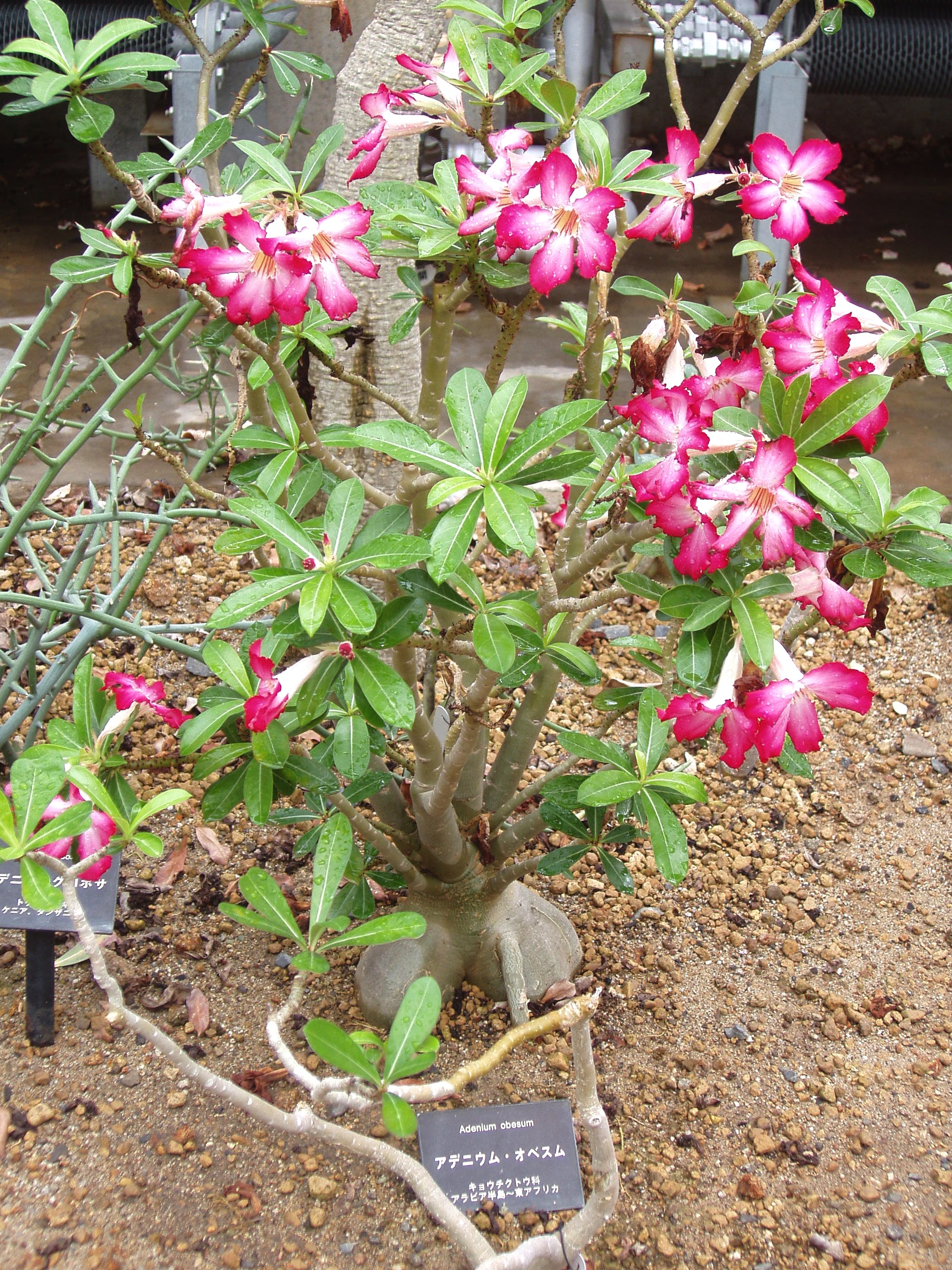 Adenium obesum (Kyoto Botanical Garden, Kyoto, Japan).